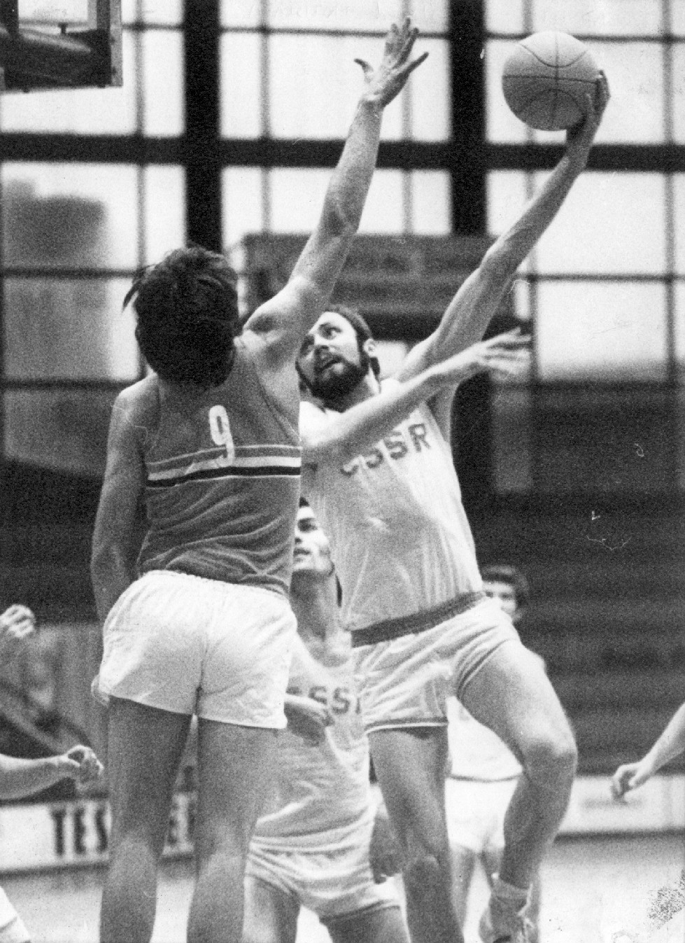 Petr Novický